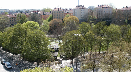 Lilla Blecktornsparken, Stockholm, Sweden.